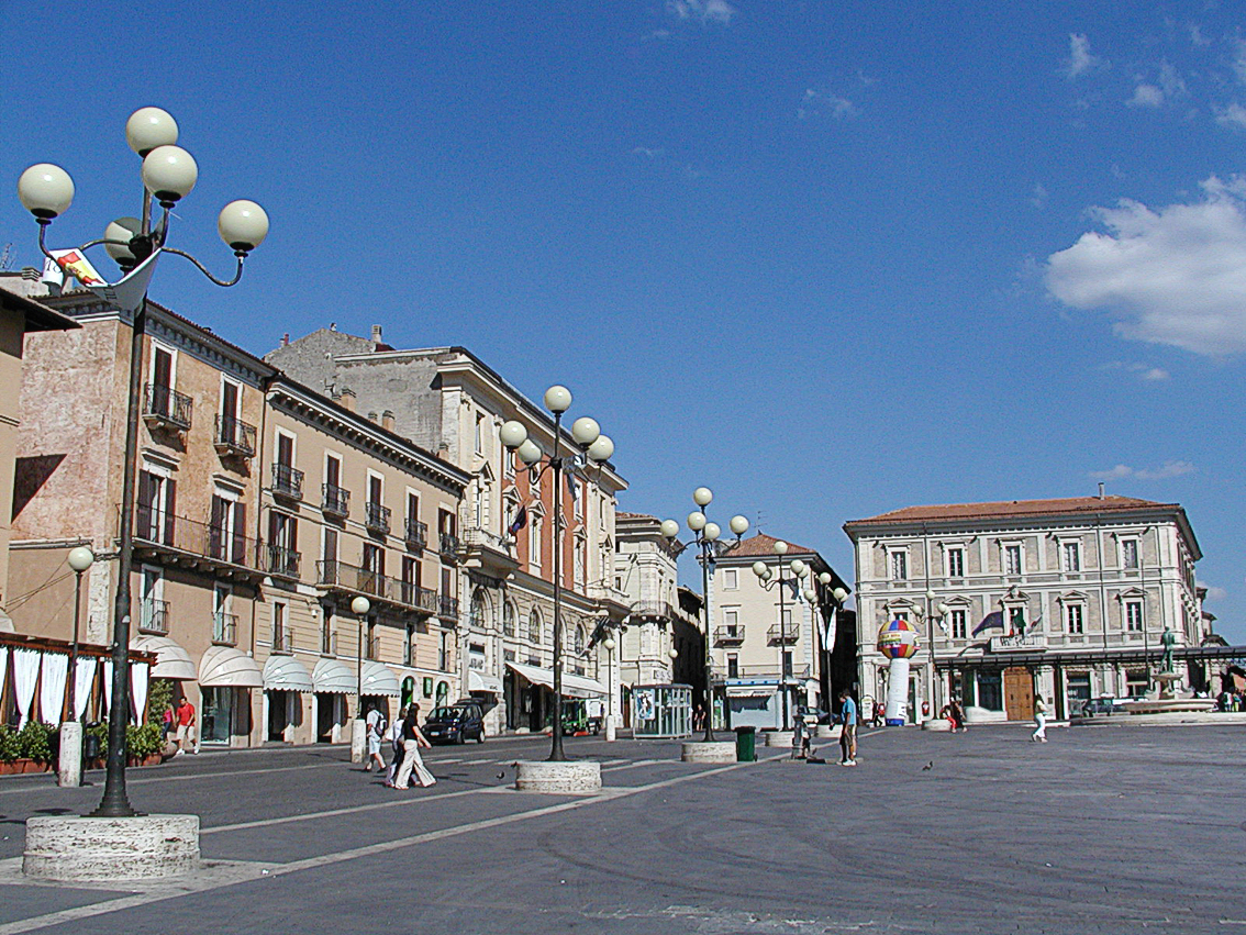 Piazza del Duomo